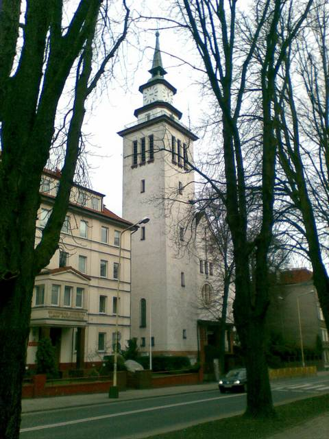 Szczecin, Kościół pw. Najświętszego Zbawiciela przy ul. Słowackiego 1A na Niebuszewie-Bolinku wpisany do rej. zab. pod nrem 62[1]